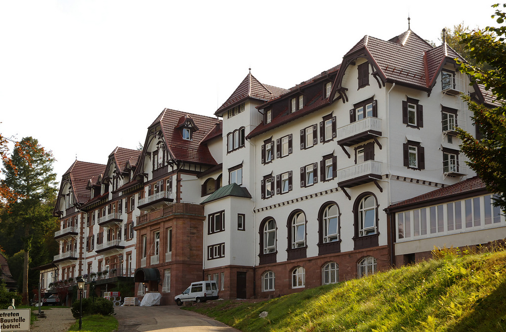 Das ehemalige Kurhaus Palmenwald in Freudenstadt, erbaut 1895. Bevor es als Wellnesshotel wiedereröffnete, diente es 2007 als Drehort für den Spielfilm Weitertanzen und ab 2007 für die ARD-Fernsehfilmreihe Der Schwarzwaldhof.